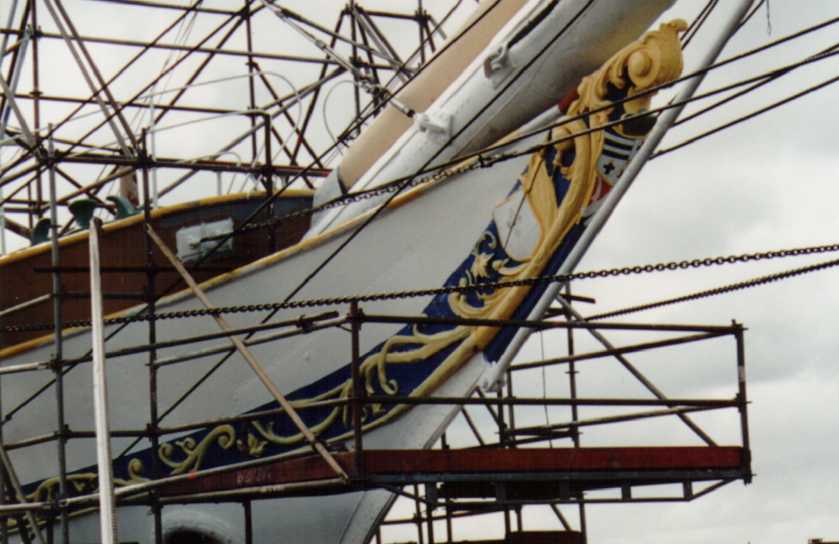 Restauration de la figure de proue du trois-mâts carré Duchesse Anne (Musée portuaire de Dunkerque, Nord, France).